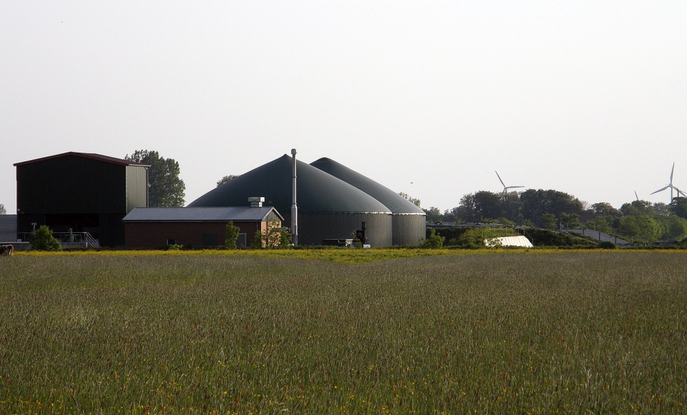 Die Biogasanlage in Neuhaus (Oste)